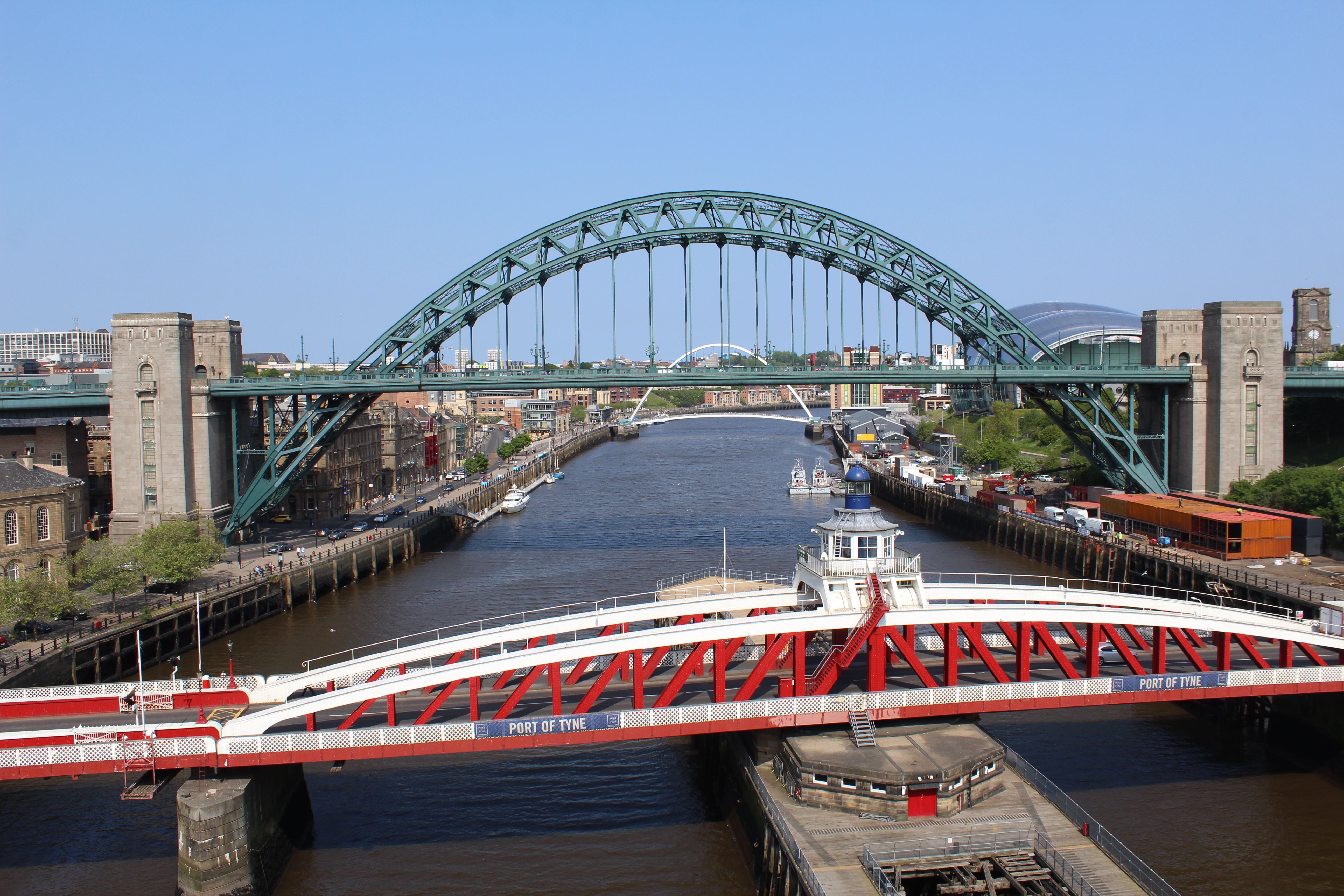 Pont Tyne, Newcastle upon Tyne.